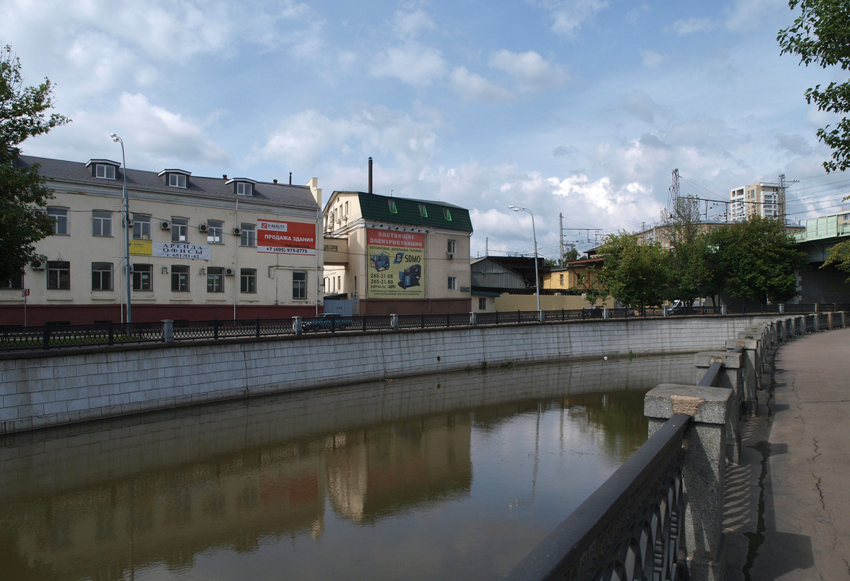 Rubtsovskaya Embankment - old factories near Elektrozavodsky Bridge.